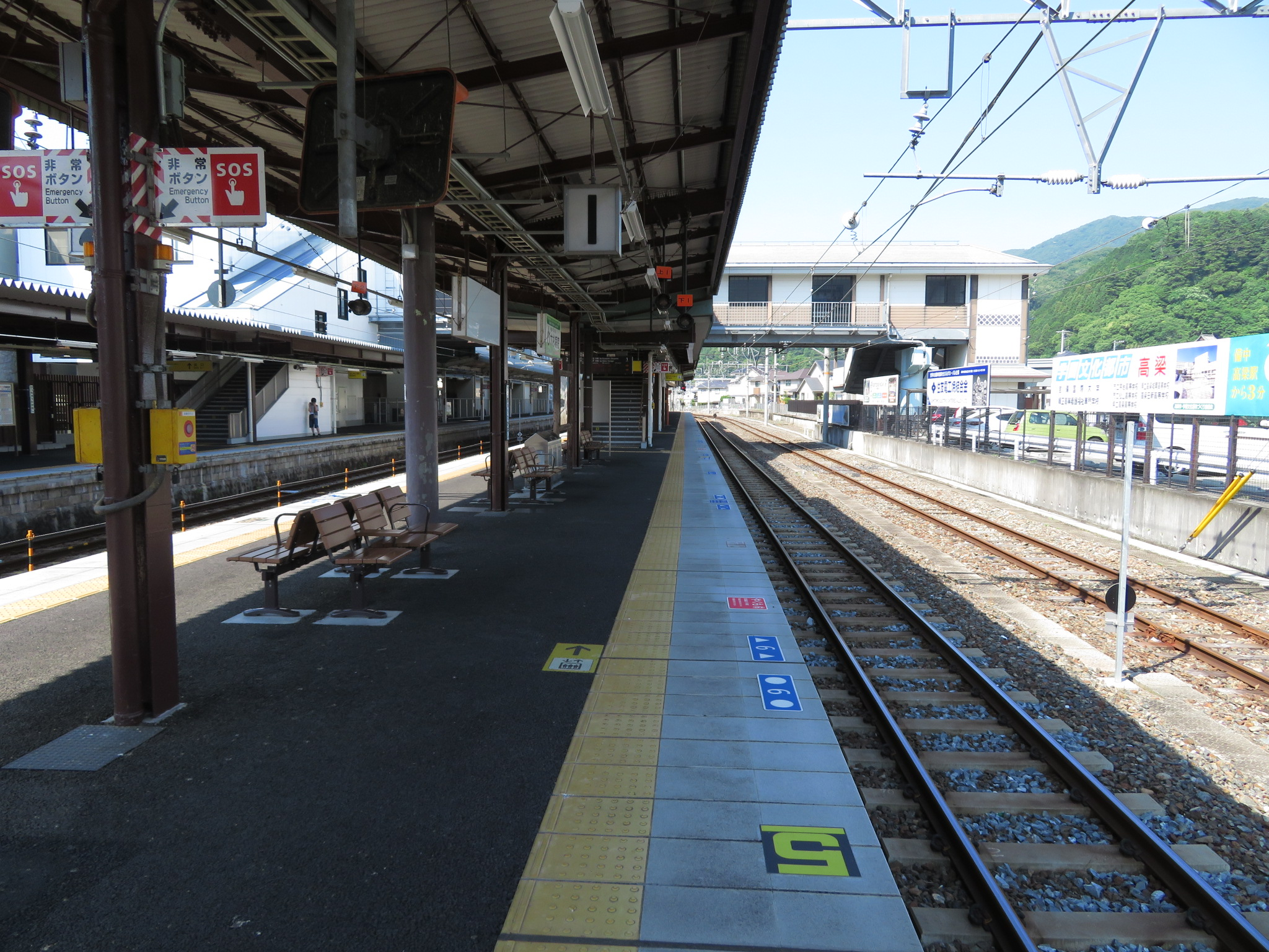 備中高梁駅1番ホーム